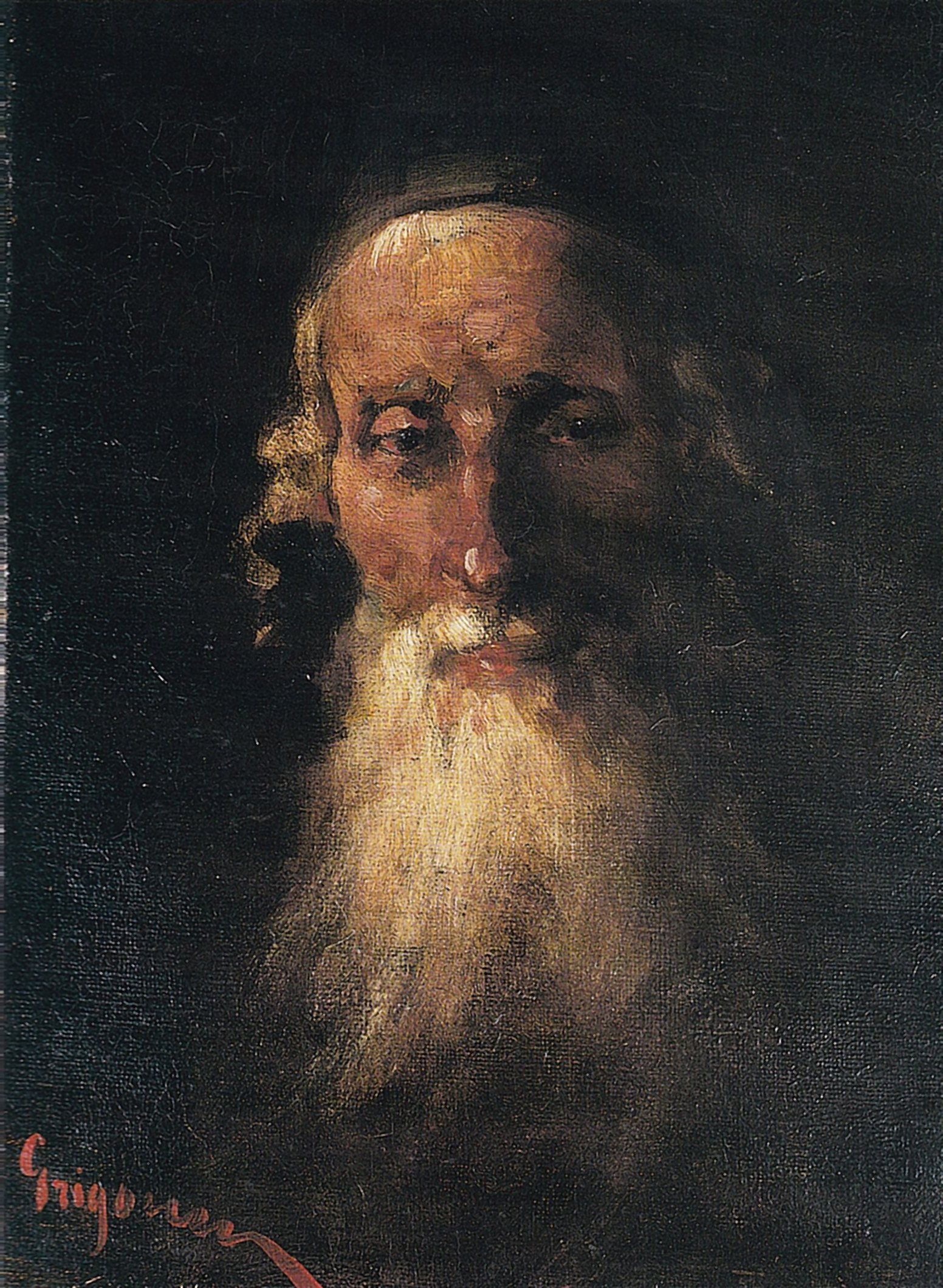 Cămătarul, ulei pe pânză, 26.3x19.8cm, marginile de la dreapta și stânga îndoite, semnat stânga jos cu roșu Grigorescu - Muzeul de Artă din Cluj